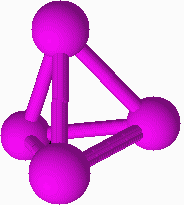 Bílý fosfor